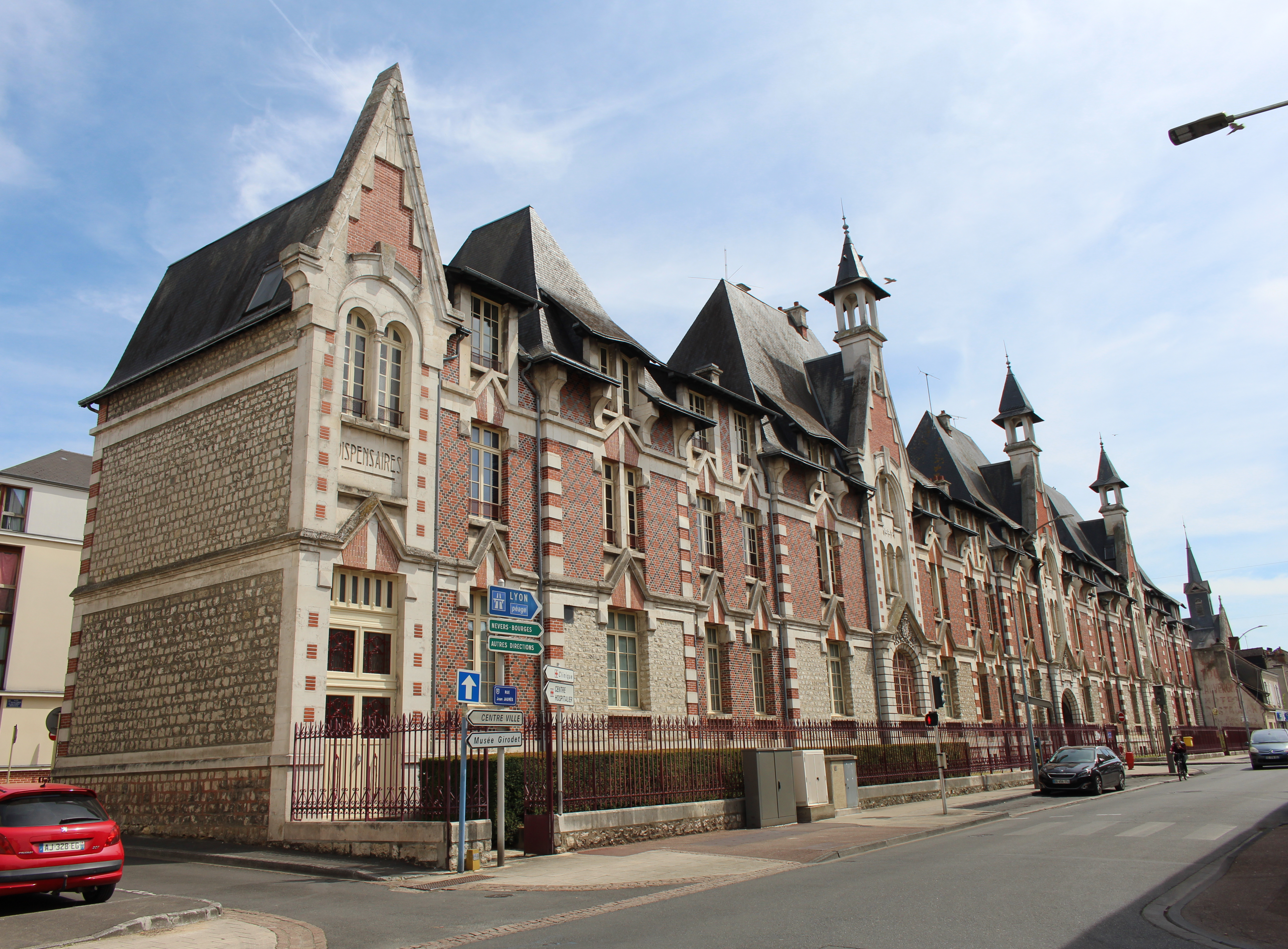 Hôpital-hospice à Montargis.